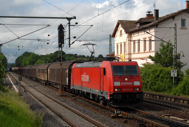 185 212 verläßt den Bahnhof Lang Göns